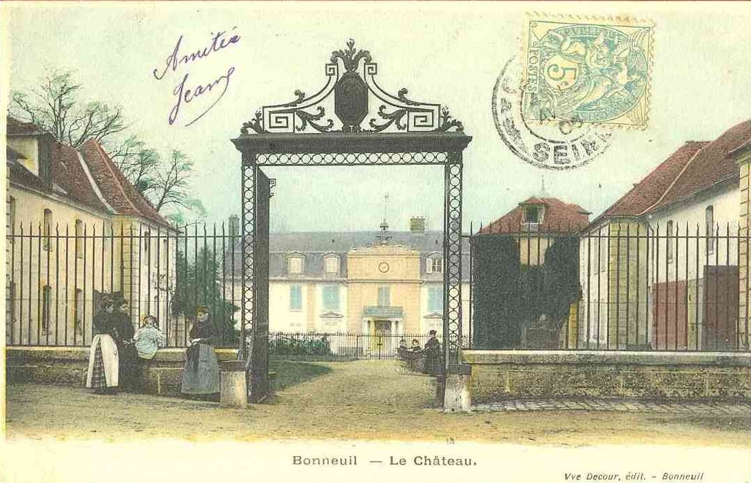 Carte postale, le château du Rancy a Bonneuil-sur-Marne